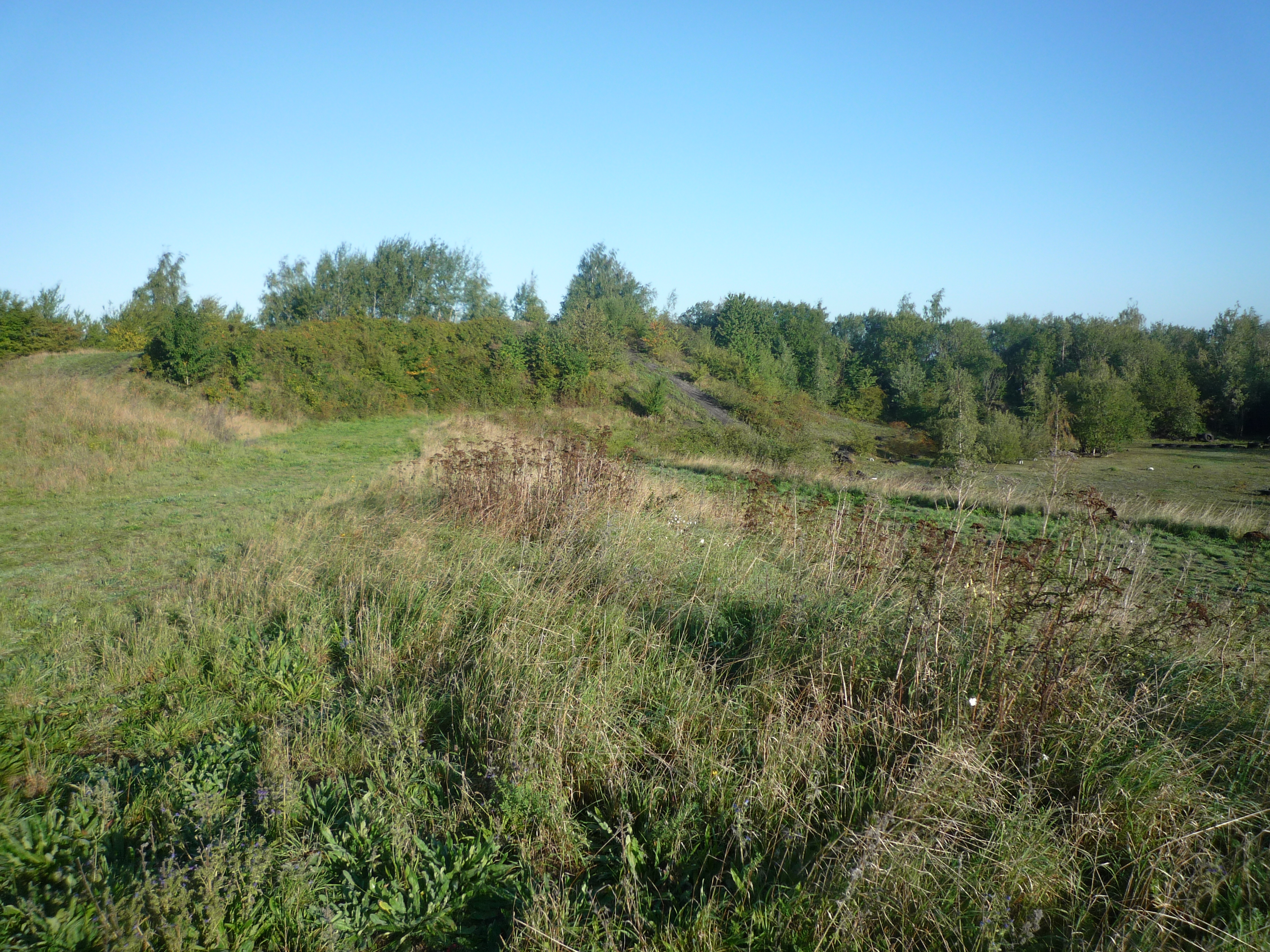 Terril Lambrecht Ouest de la Fosse Lambrecht de la Compagnie des mines d'Anzin à Wallers, Nord, Nord-Pas-de-Calais, France.